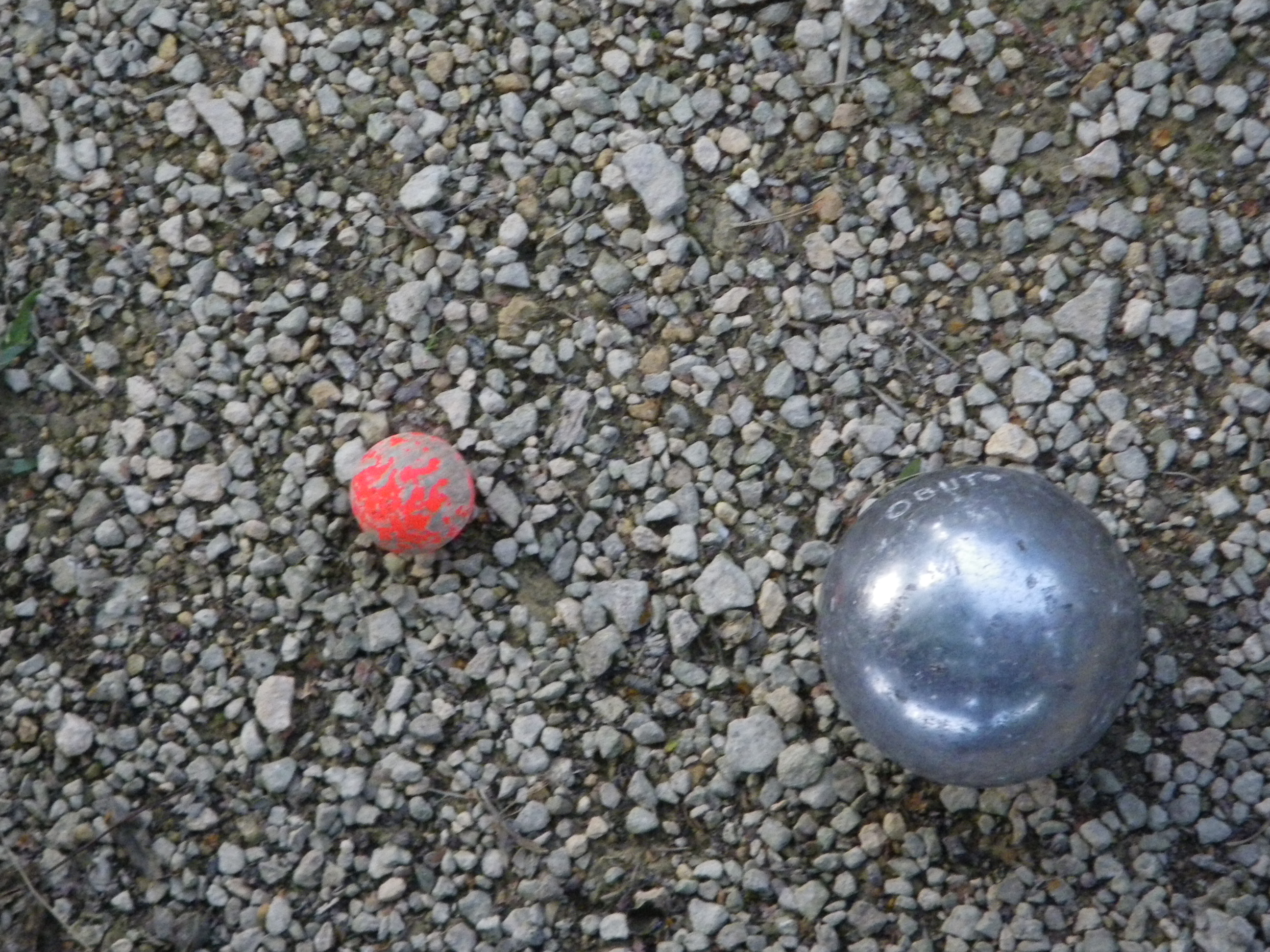 Pétanque point gagnant